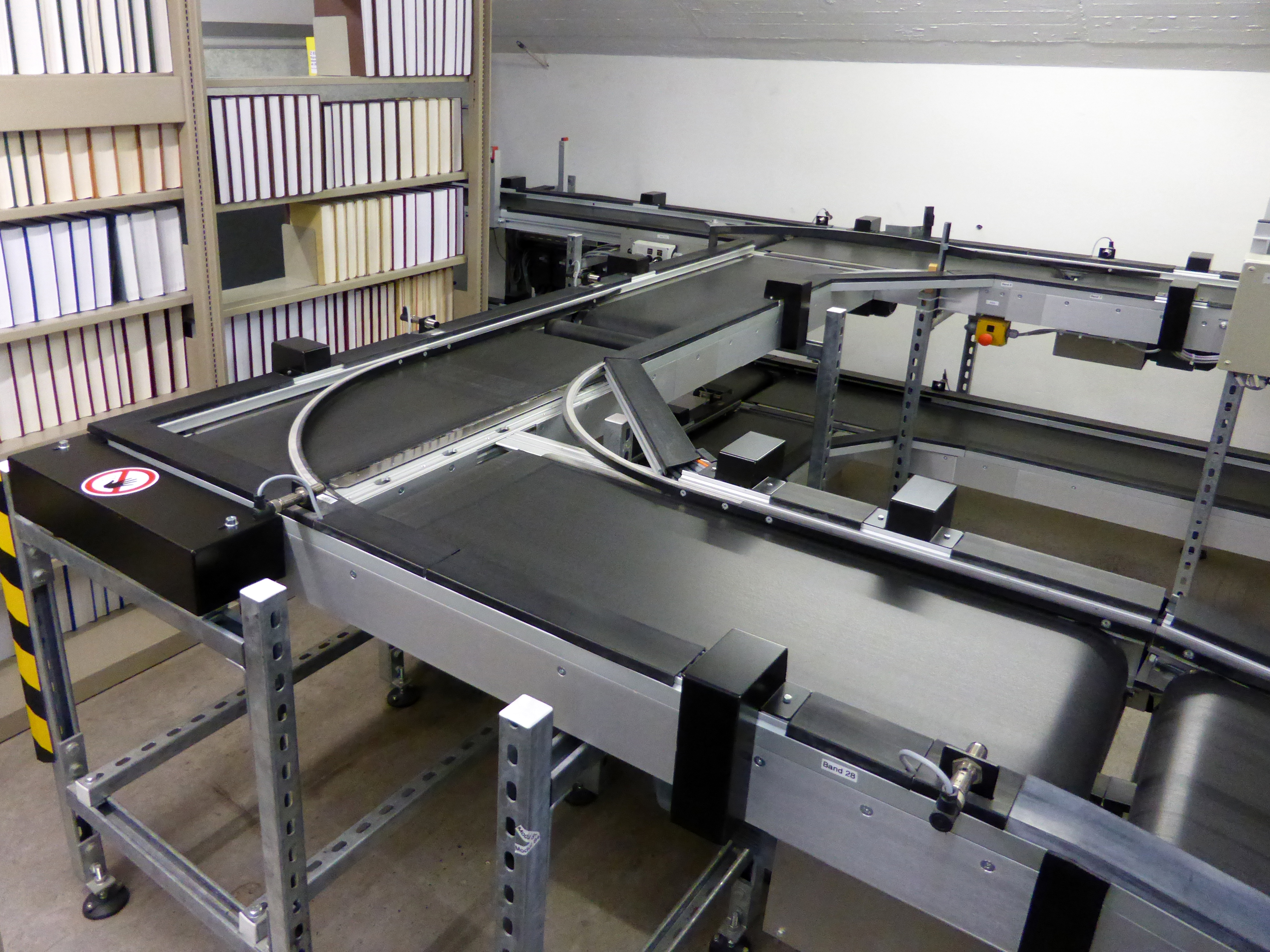 TELELIFT Bücherförderband im Magazin der Bayerischen Staatsbibliothek (7.OG).